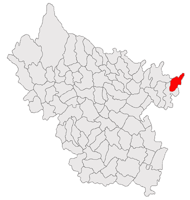 Categorie:Hărţi ale judeţului Buzău